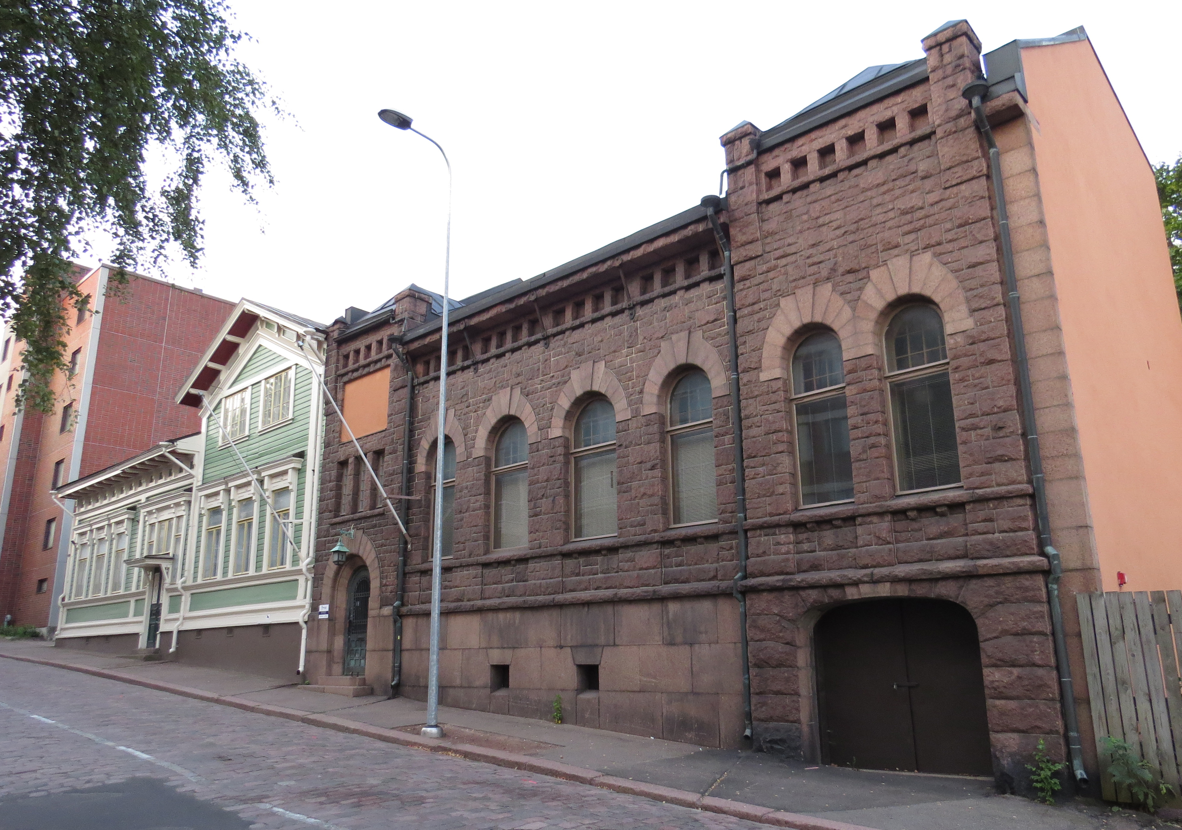 Laivurinkatu 7 eli niin sanottu Satamakonttorin rakennus Kotkassa. Kivinen osa alun perin Pohjoismaiden Osakepankki, suunnitellut Waldemar Aspelin vuonna 1908.